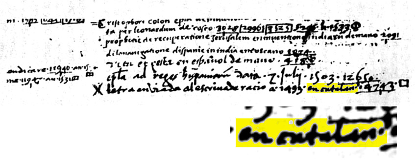 Detall de l'Index de la Biblioteca Colombina on Hernando Colom apuntà que la Carta a Lluis de Santàngel del 15 de Febrer de 1492 estava escrita "en catalán".